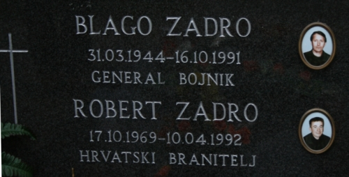 Grob Blaga Zadra i Roberta Zadra na Memorijalnom groblju u Vukovaru